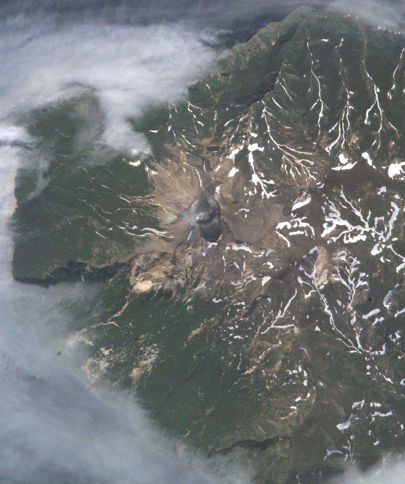 Вулкан Синарка. Снимок с МКС. Фрагмент